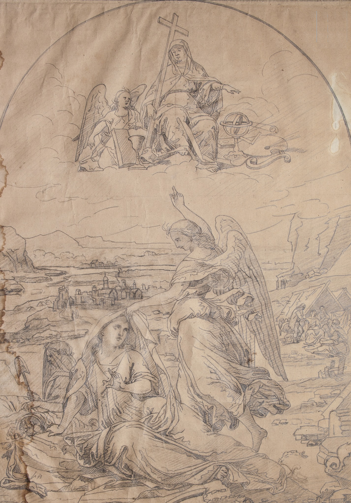 Renașterea României desen la Muzeul Gheorghe Tattarescu